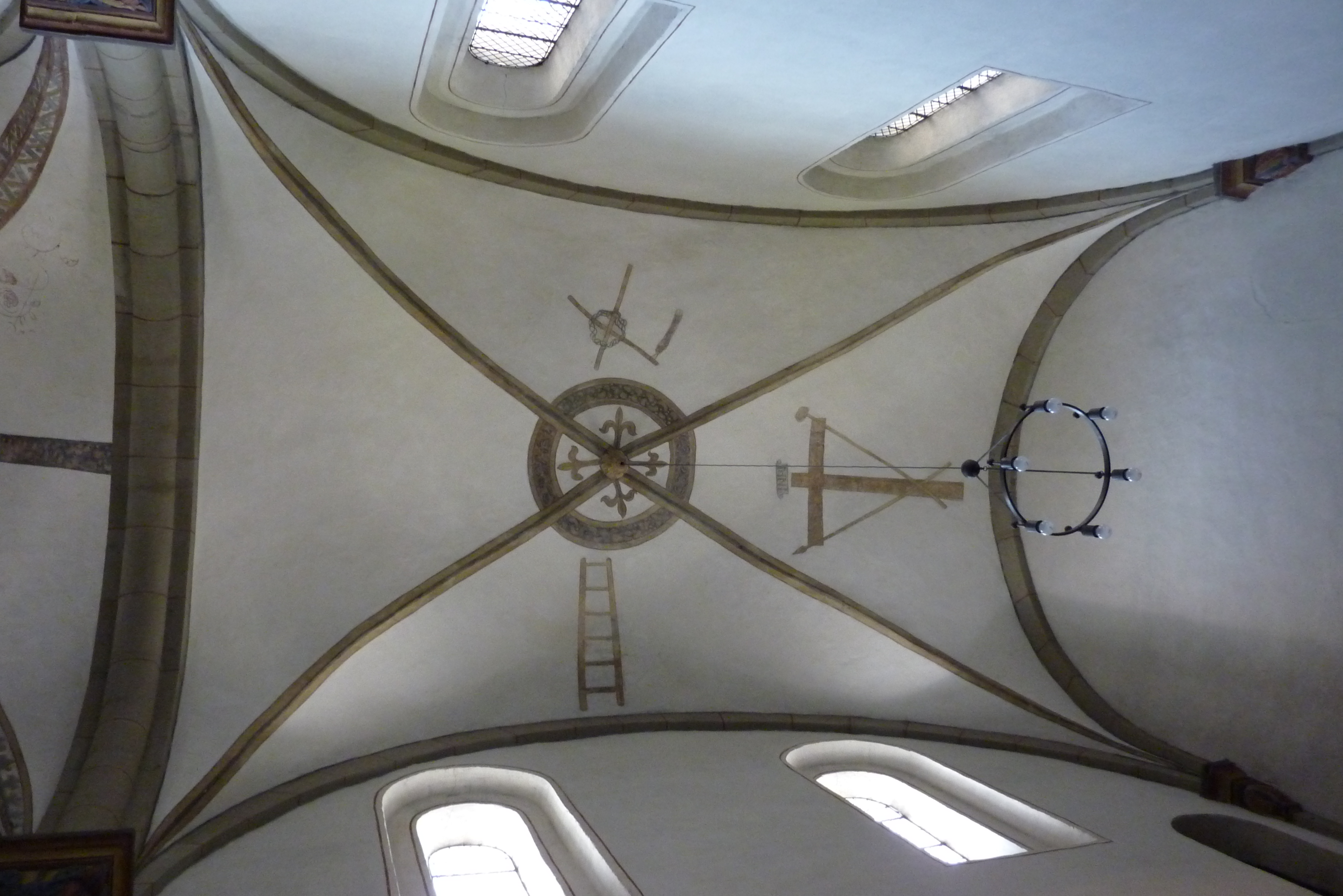 Katholische Pfarrkirche St. Cyriakus in Niedermendig, Deckenmalerei vor 1200, Arma Christi